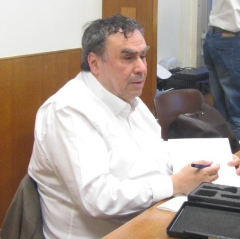 Benjamin Stora lors de la conférence "Juifs et musulmans, pourquoi la séparation ?"